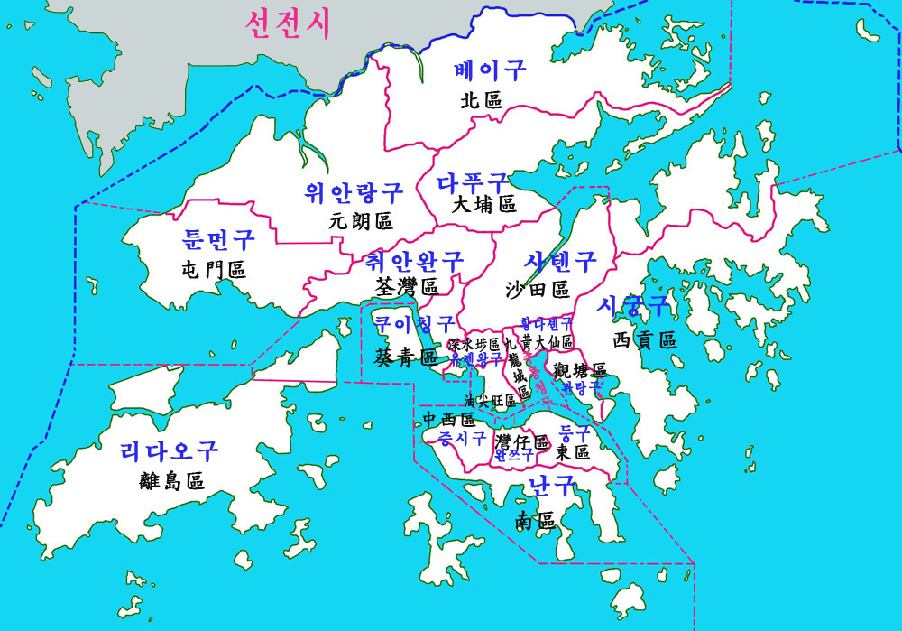 홍콩시 시할구